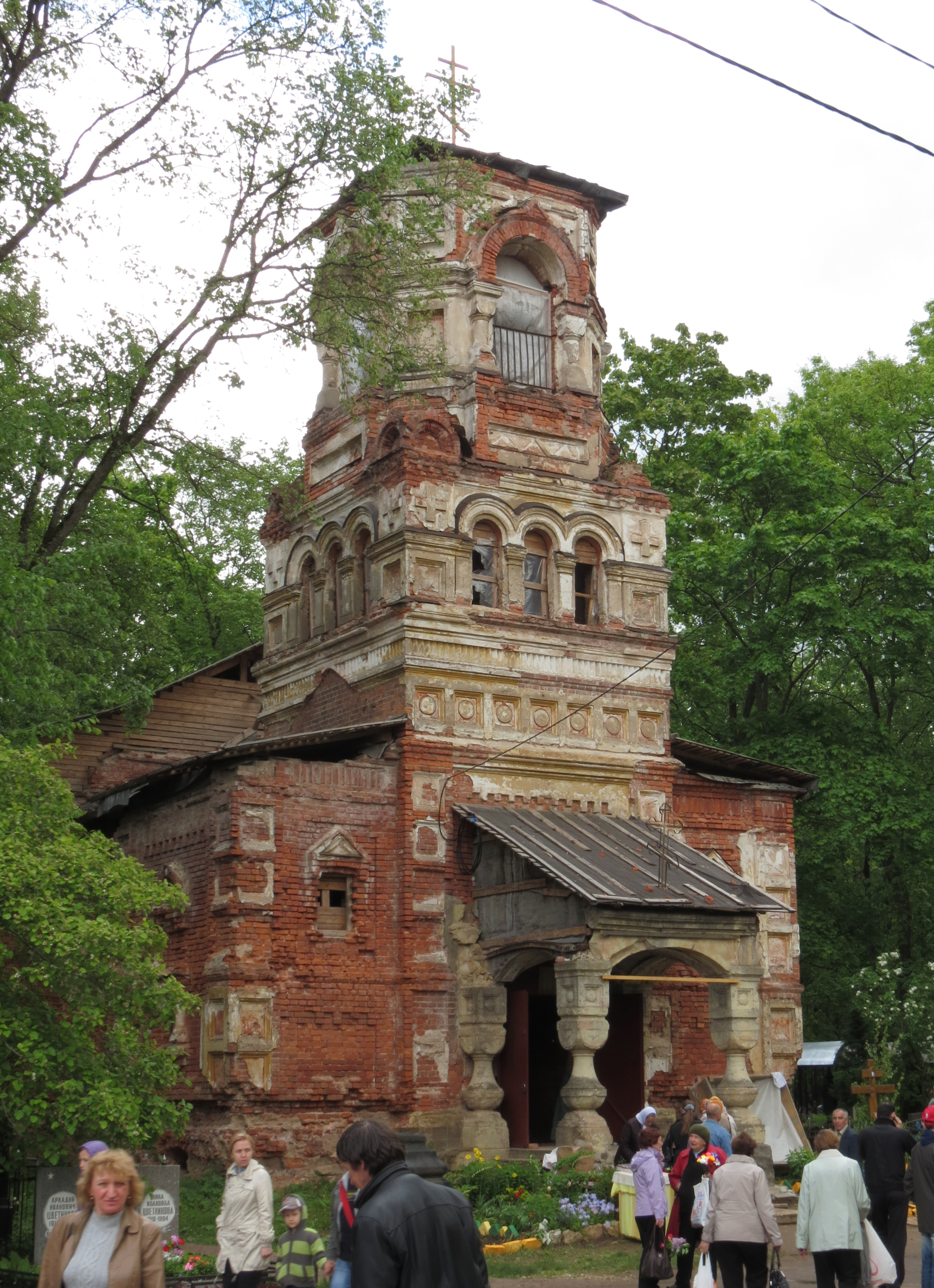 Церковь Всех Святых, Гатчина, Ленинградская область, Россия